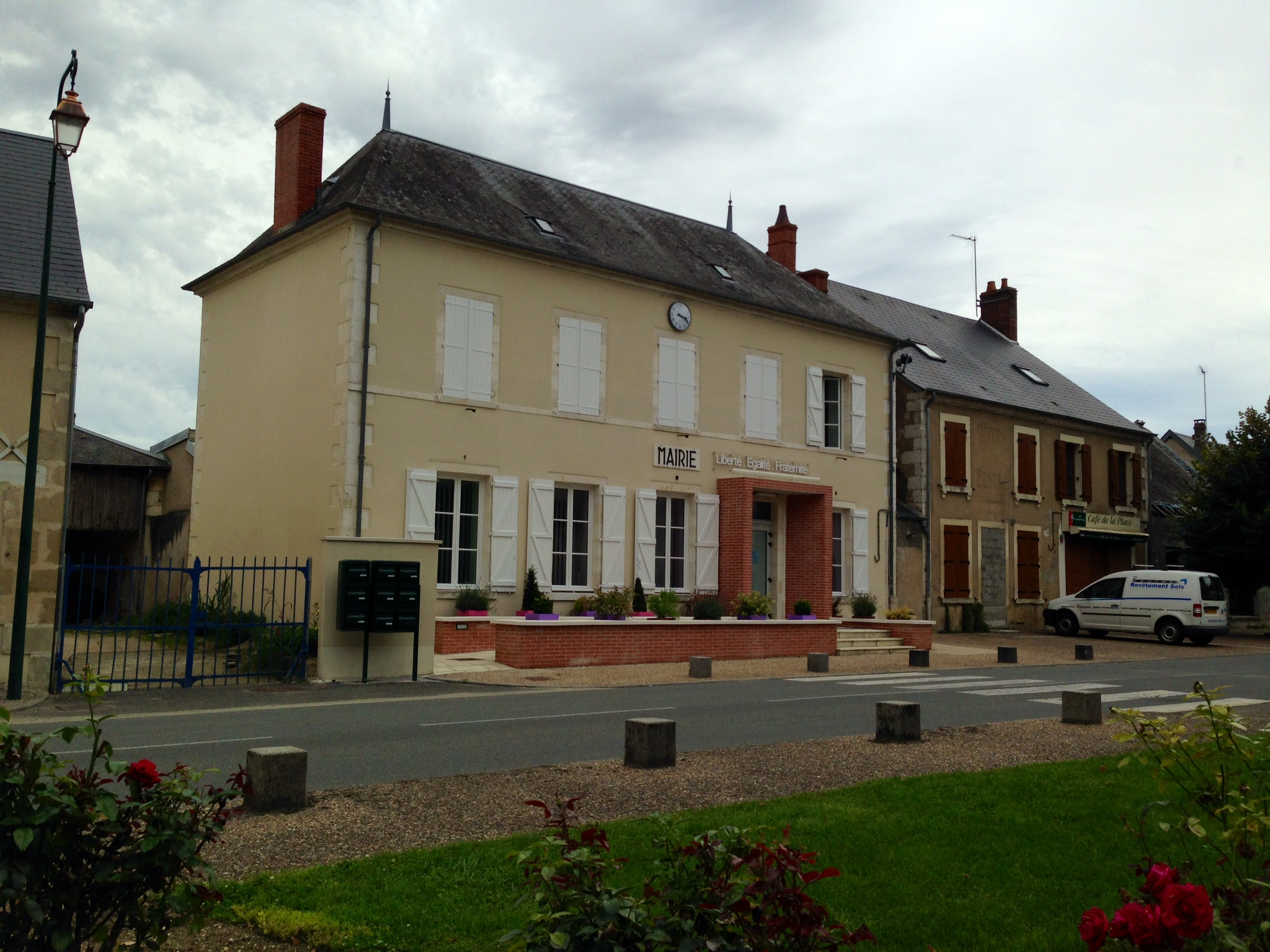 Mairie de Moulins-sur-Yèvre